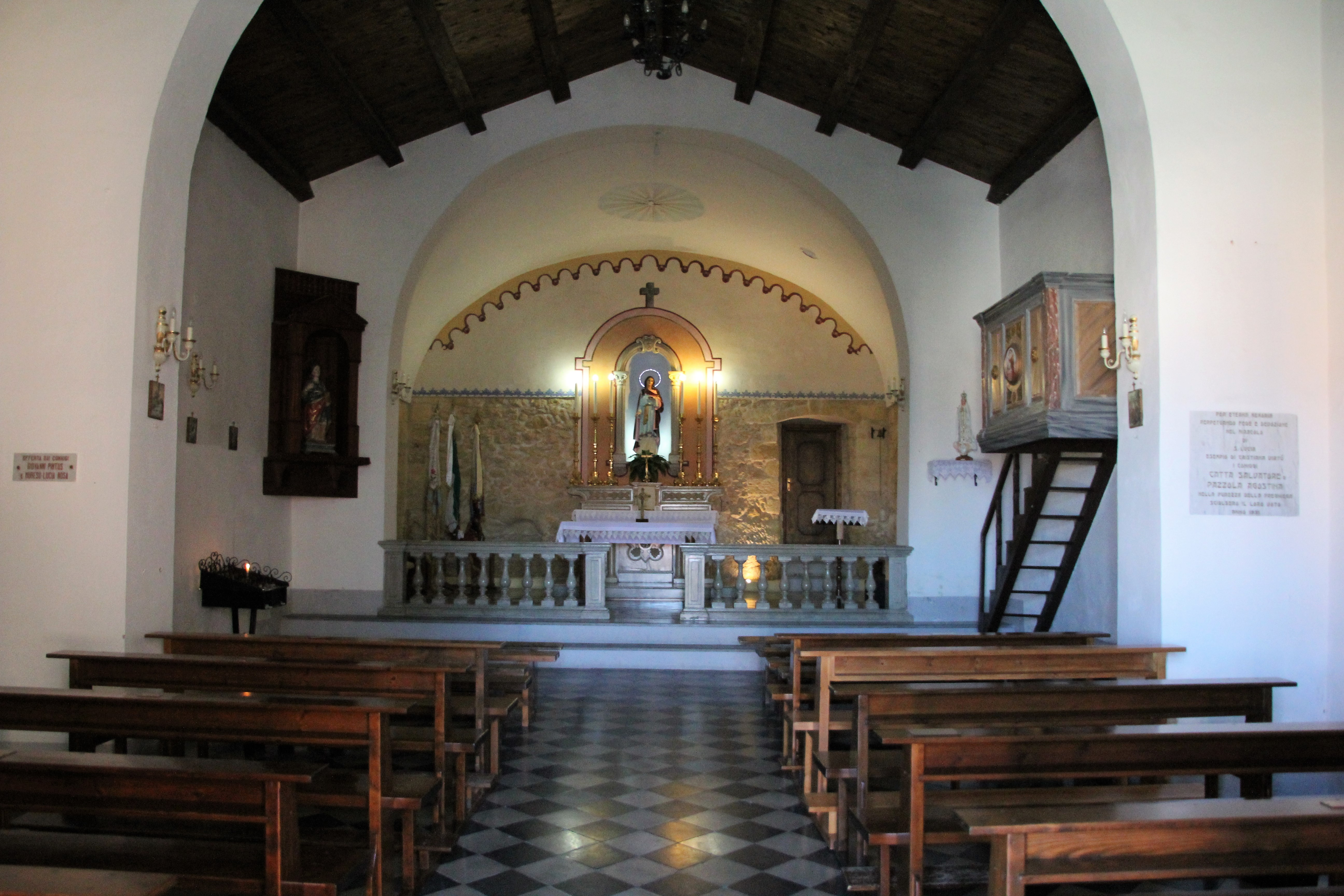 Sennori, chiesa di Santa Lucia This is a photo of a monument which is part of cultural heritage of Italy.